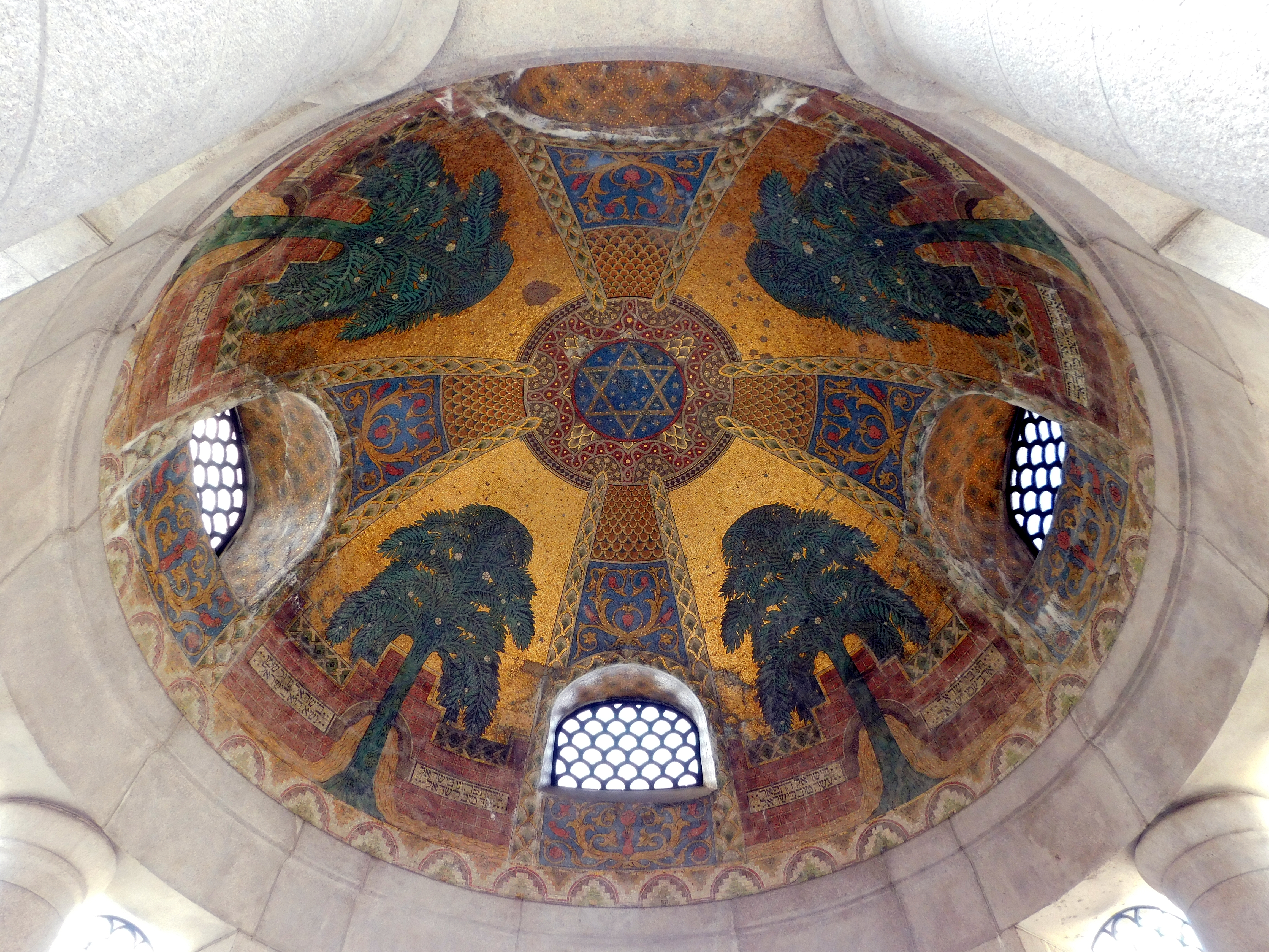 Mozaika z warsztatu A. Salvatiego na sklepieniu mauzoleum Izraela Poznańskiego.